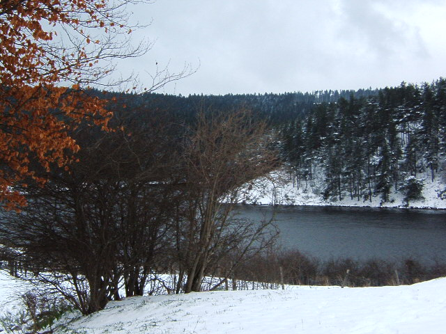 Le lac de Saint-Genest-Malifaux - Rivière La Semene - en hiver